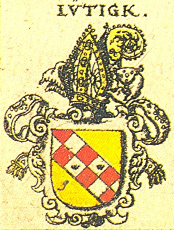 Wappen des Bistums Lütigk nach Siebmachers Wappenbuch